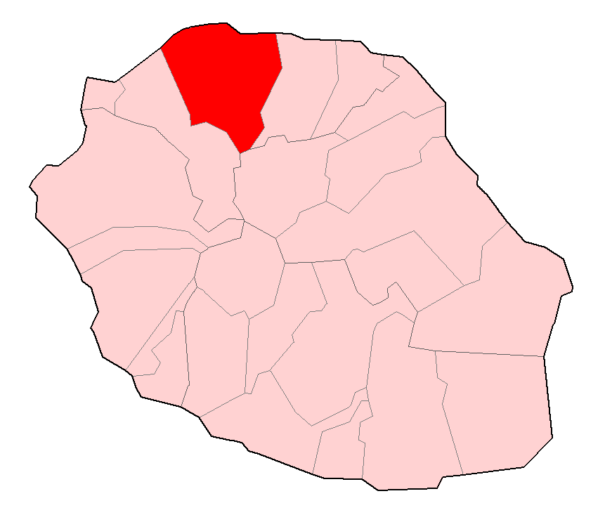 Carte de la Réunion permettant de localiser Saint-Denis.